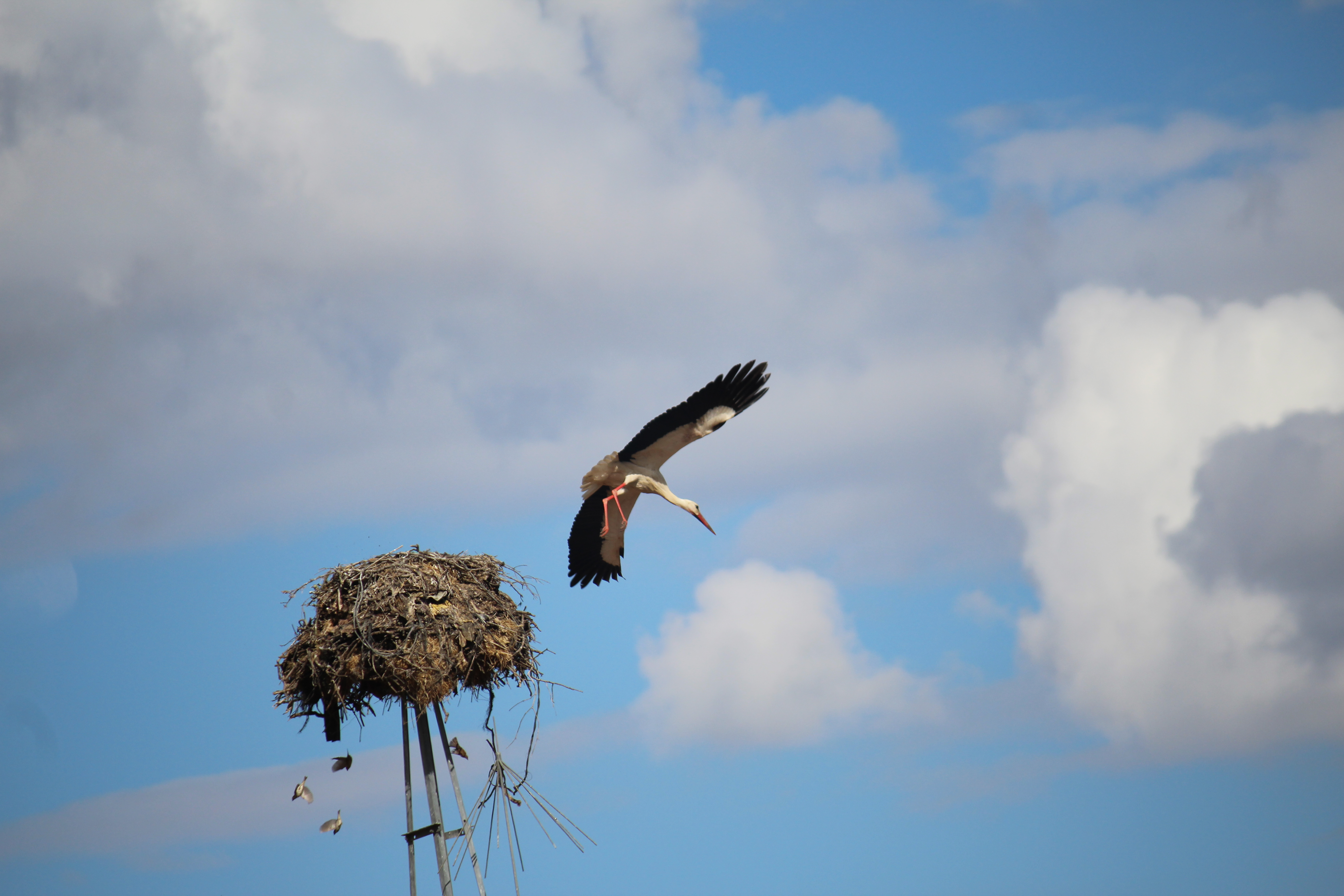 Cigüeña en dehesa extremeña